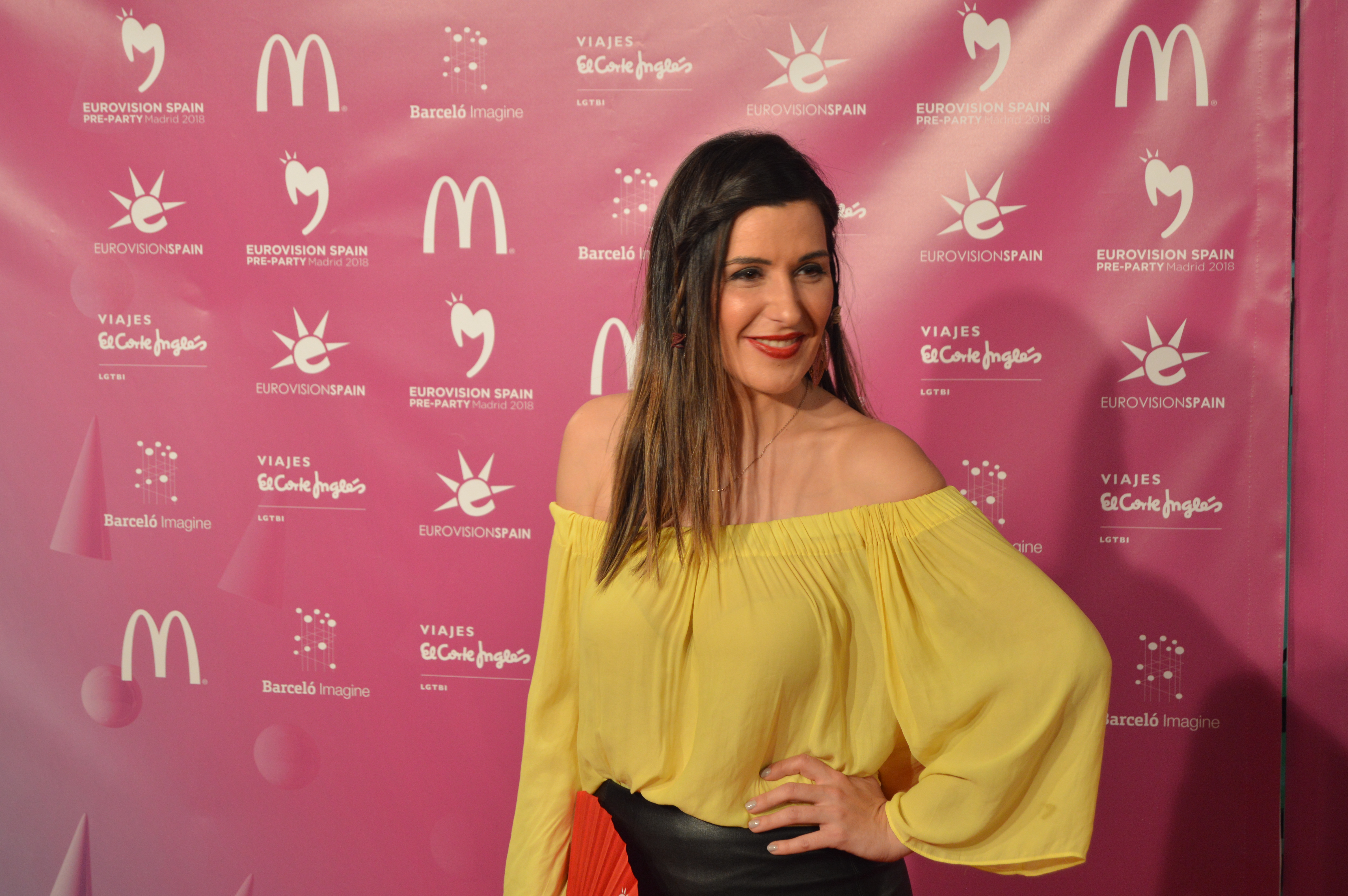 Representante de Andorra en Eurovisión 2006 posa ante los medios en la Eurovision Spain PreParty 2018 en Madrid (Abril 2018)